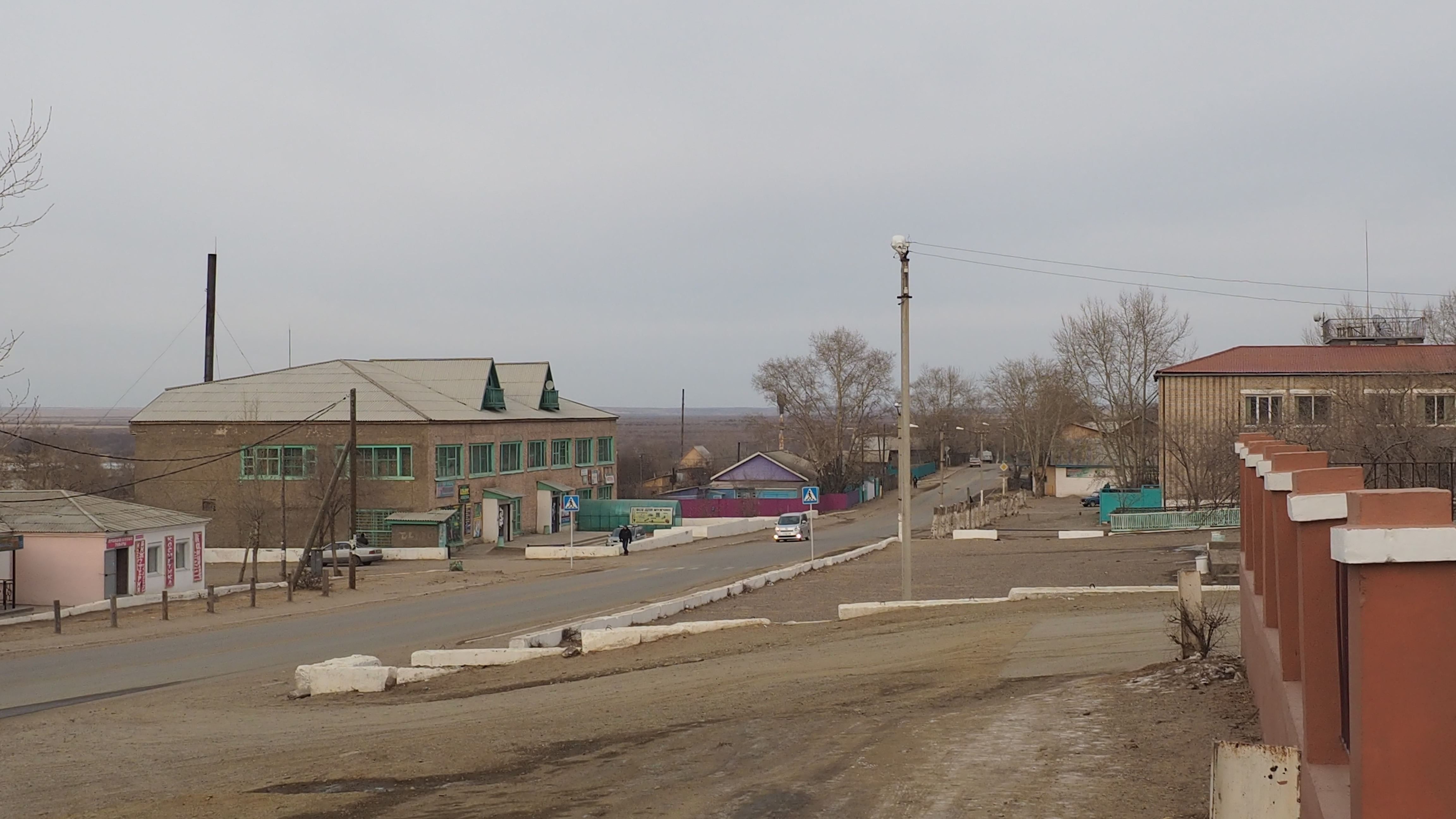 Ononskiy r-n, Zabaykalskiy kray, Russia